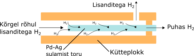 Pallaadium-hõbe kütteplokk vesiniku puhastamiseks